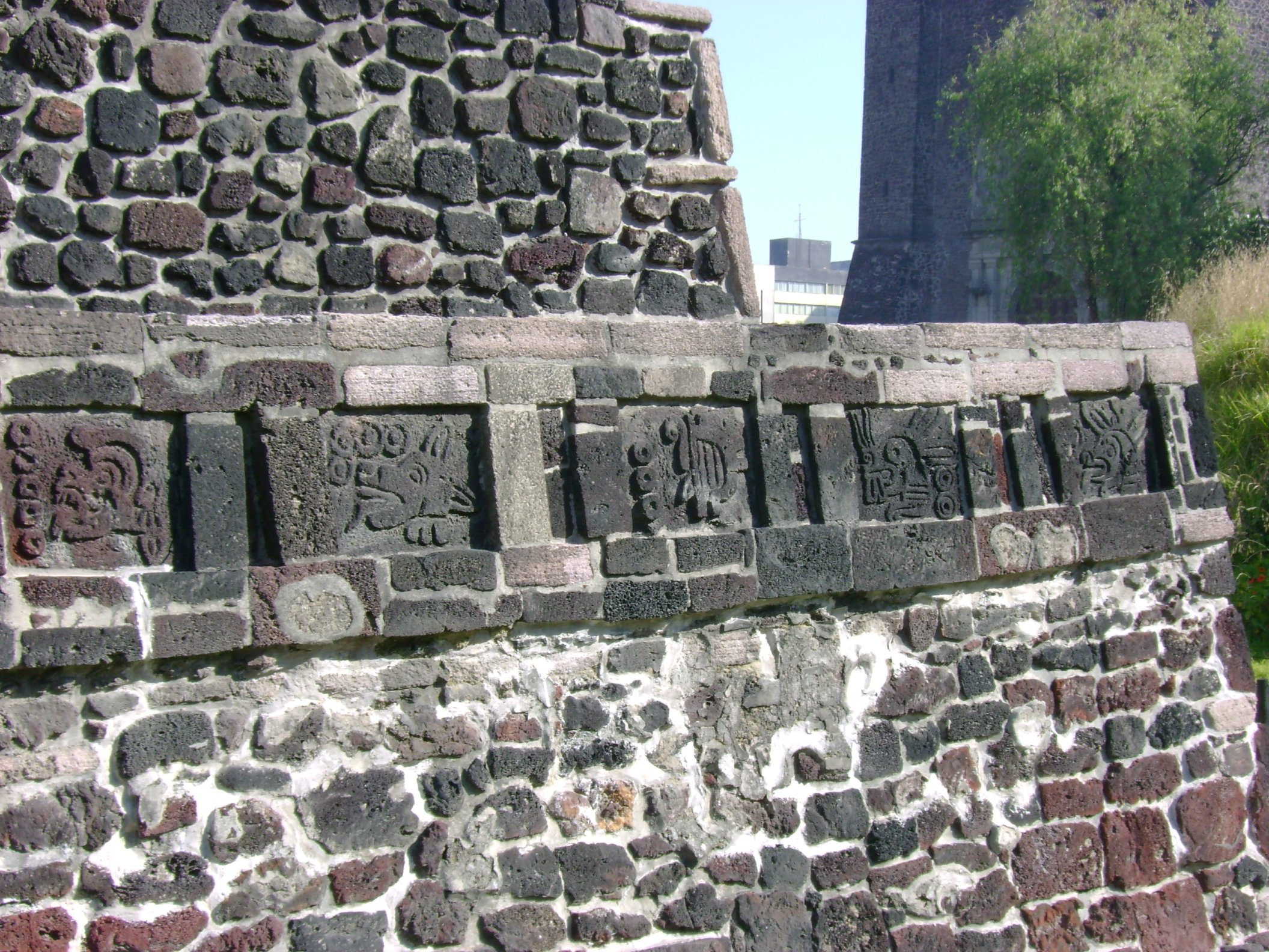 Tlatelolco, Cidade do México